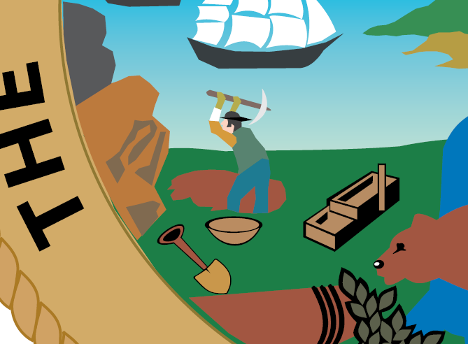 Détail du sceau de la Californie (cette [ image) montrant plus précisément un forty-niner en train de creuser avec une pioche et une pelle, une batée et une rampe de lavage.